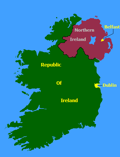 en-wiki'den